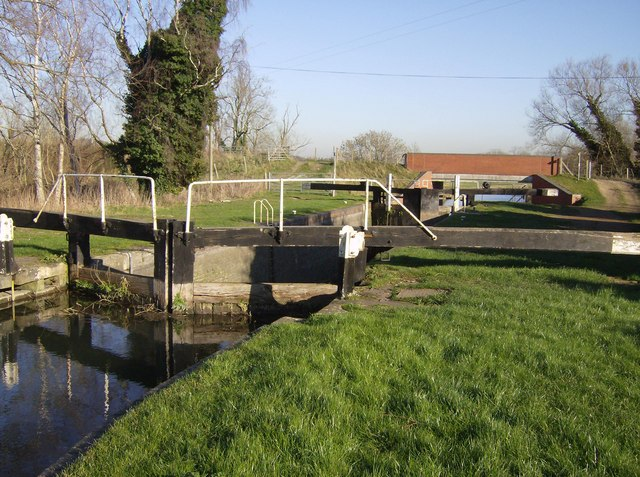 Midgham Lock